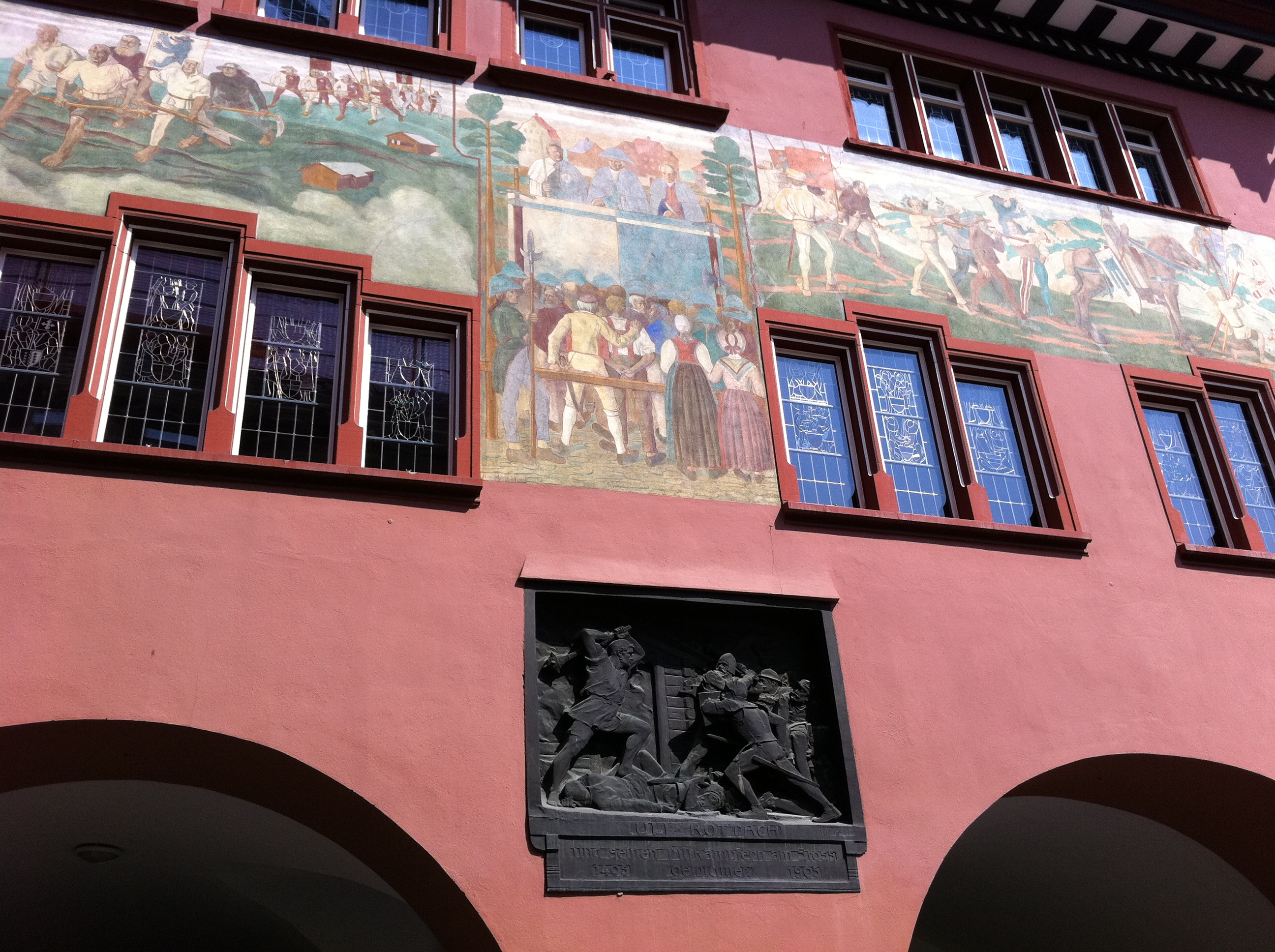 Mairie d'Appenzell